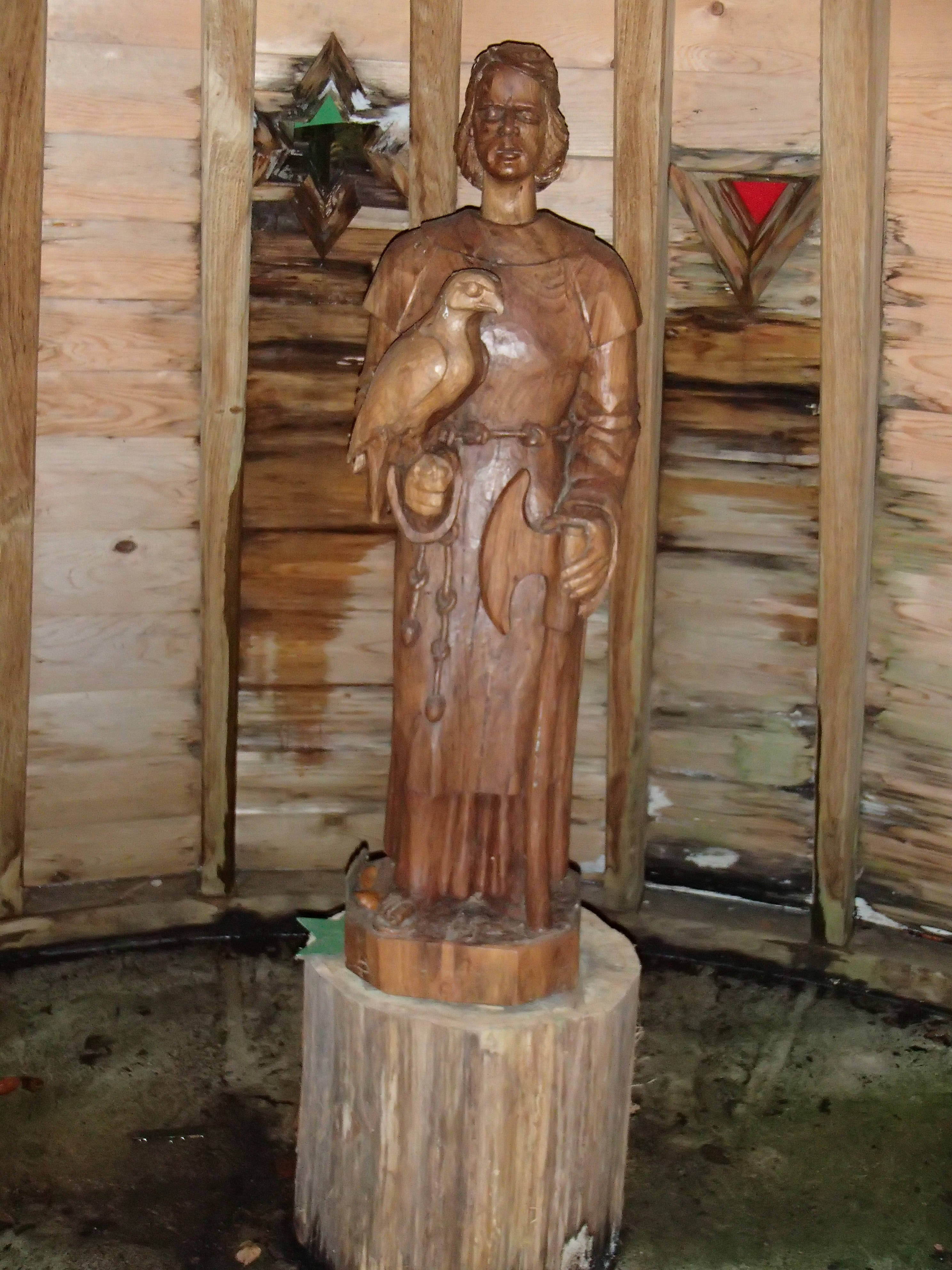 St Thibaud